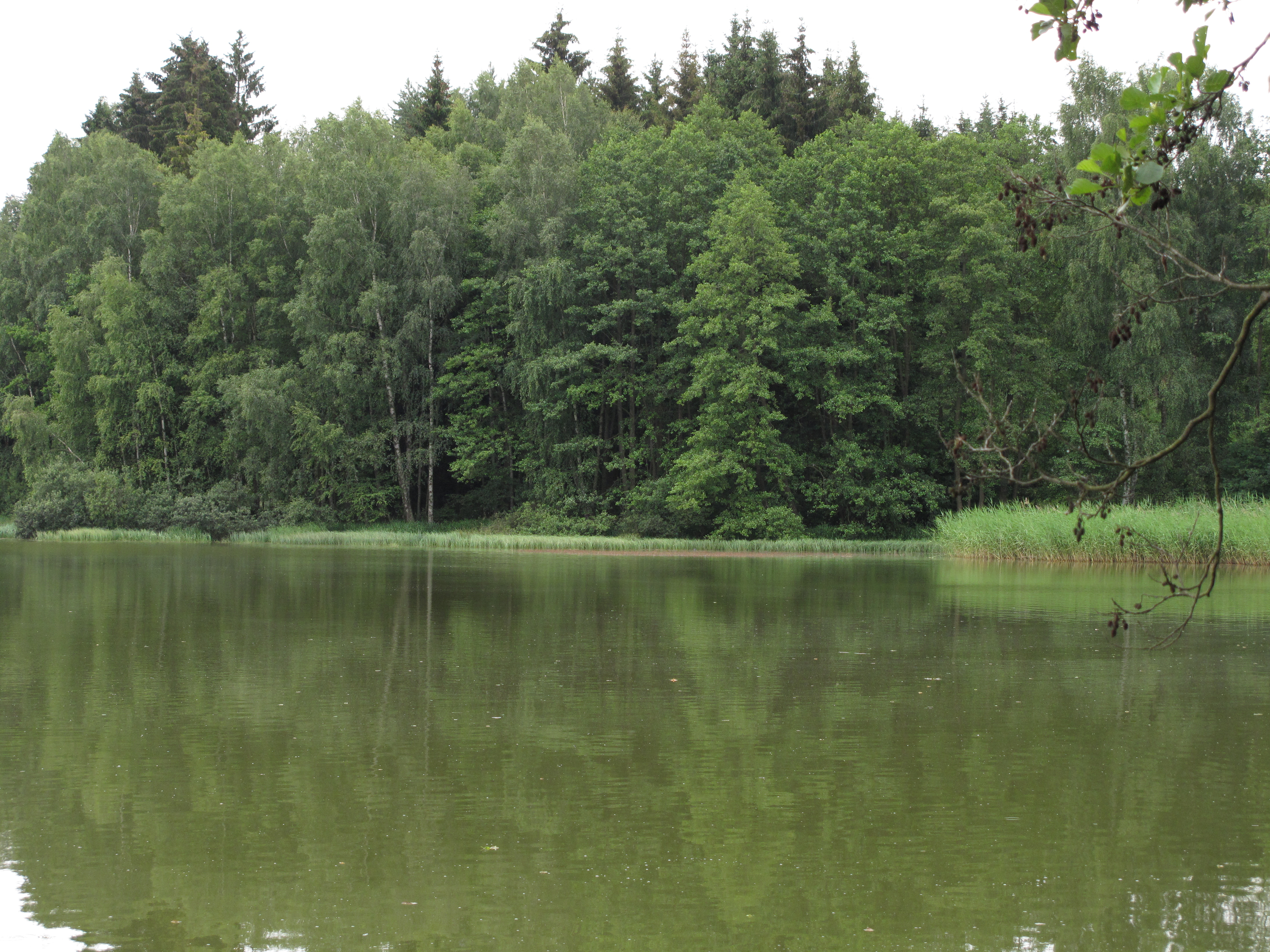 Přírodní rezervace Nový rybník. Okres Pelhřimov, Česká republika.